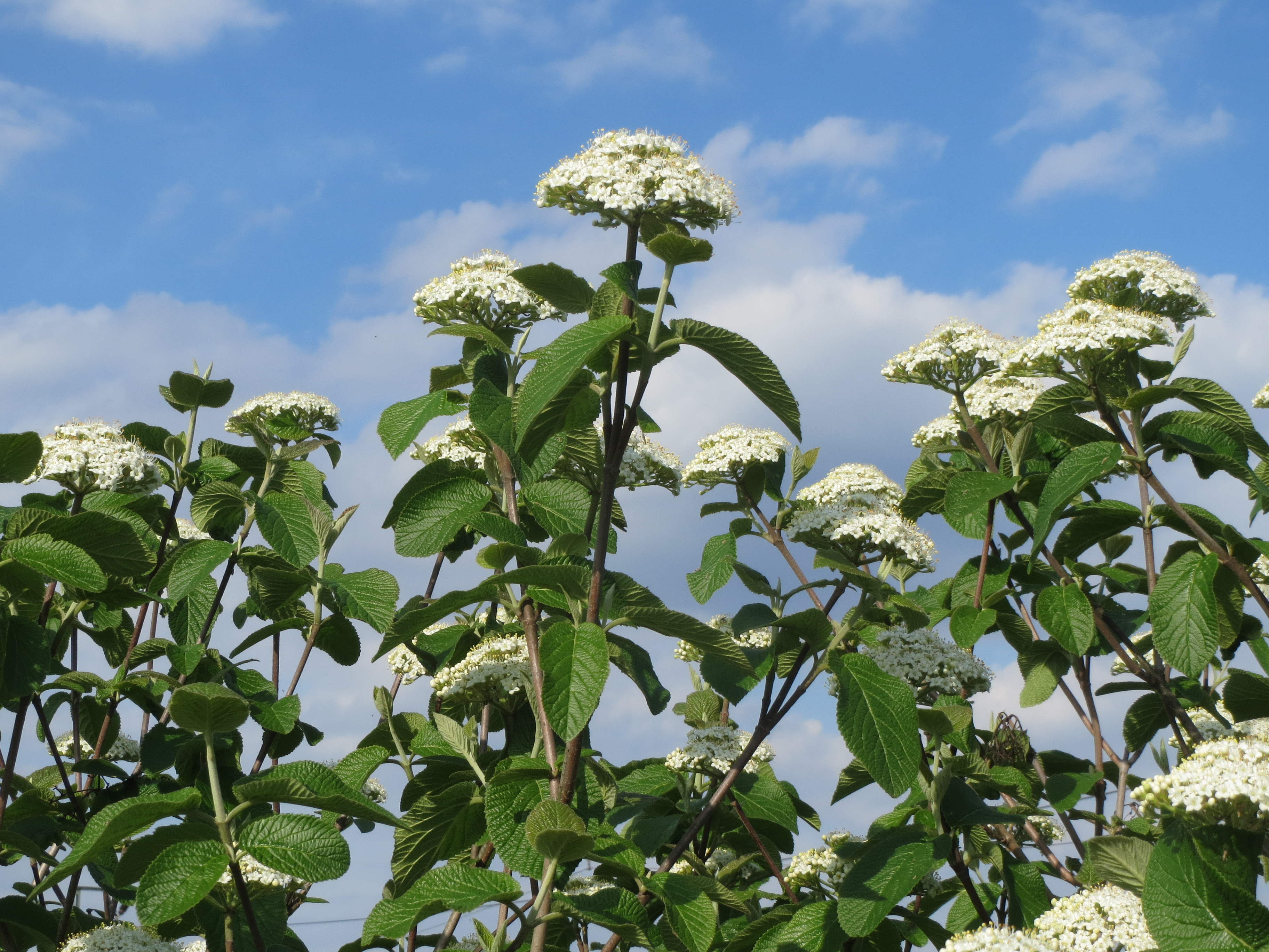 Wolliger Schneeball (Viburnum lantana) bei Neulußheim